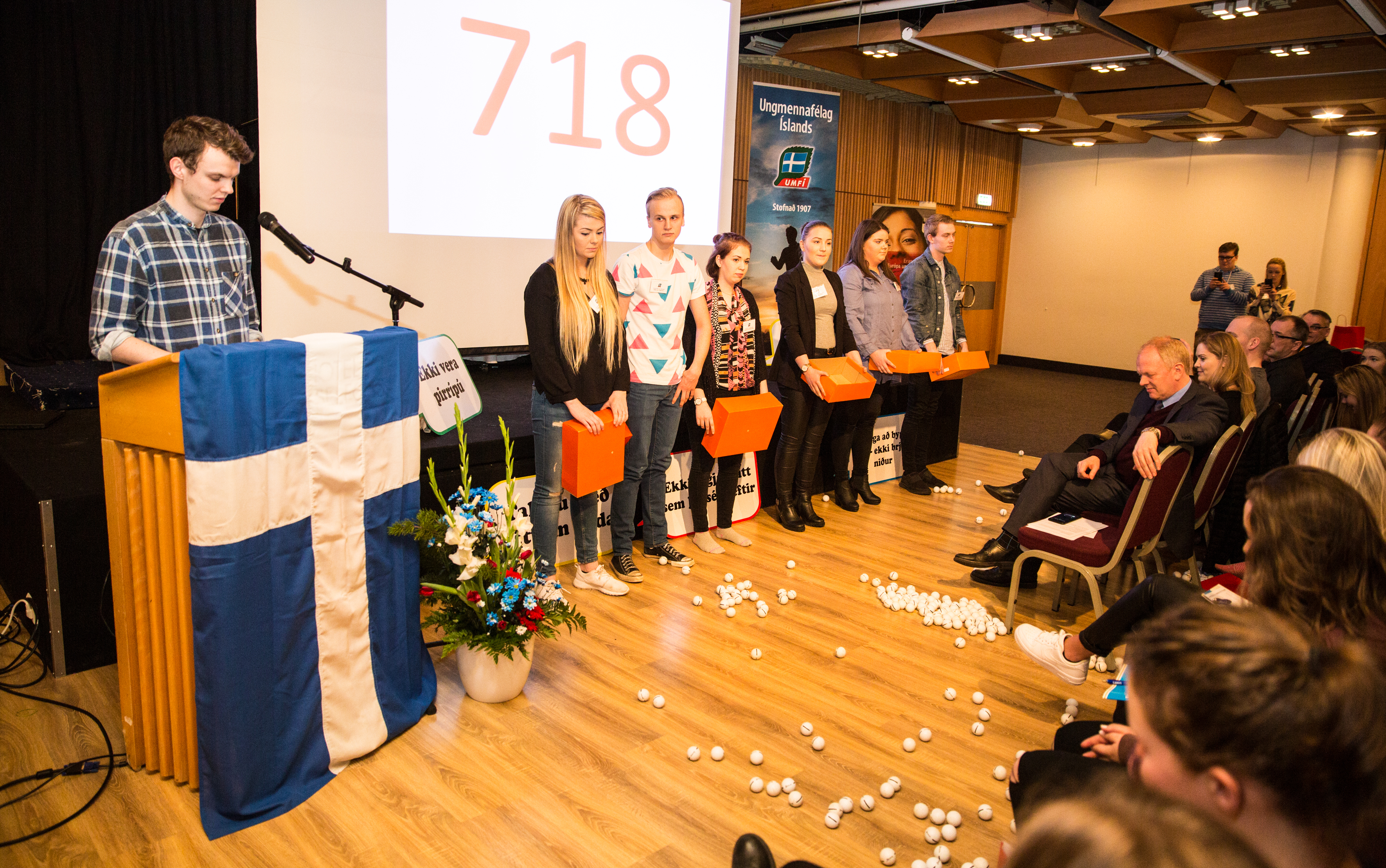 Geðheilbrigðismál ungs fólks voru aðalefni ráðstefnunnar Ungt fólk og lýðræði árið 2016.